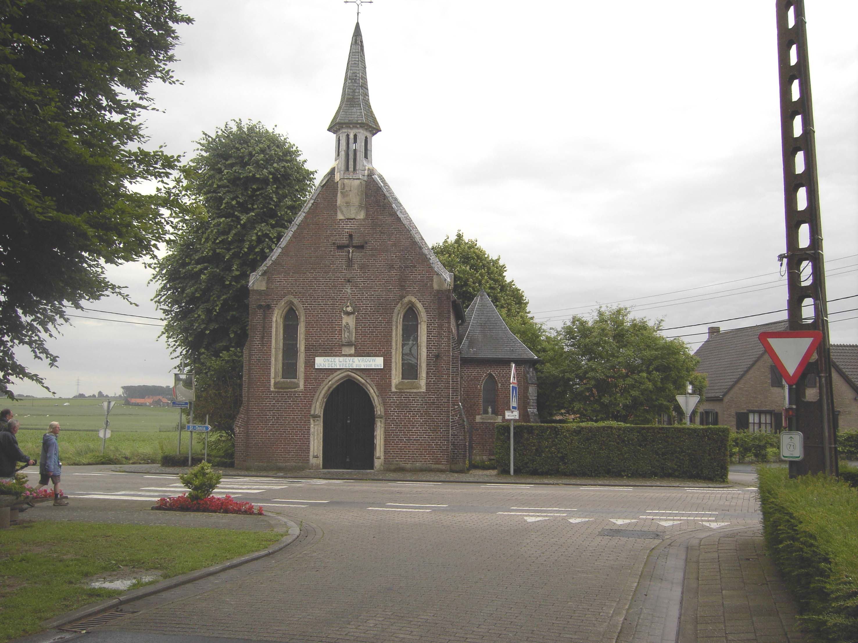 Zwevegem in Belgium - Milanenkapel